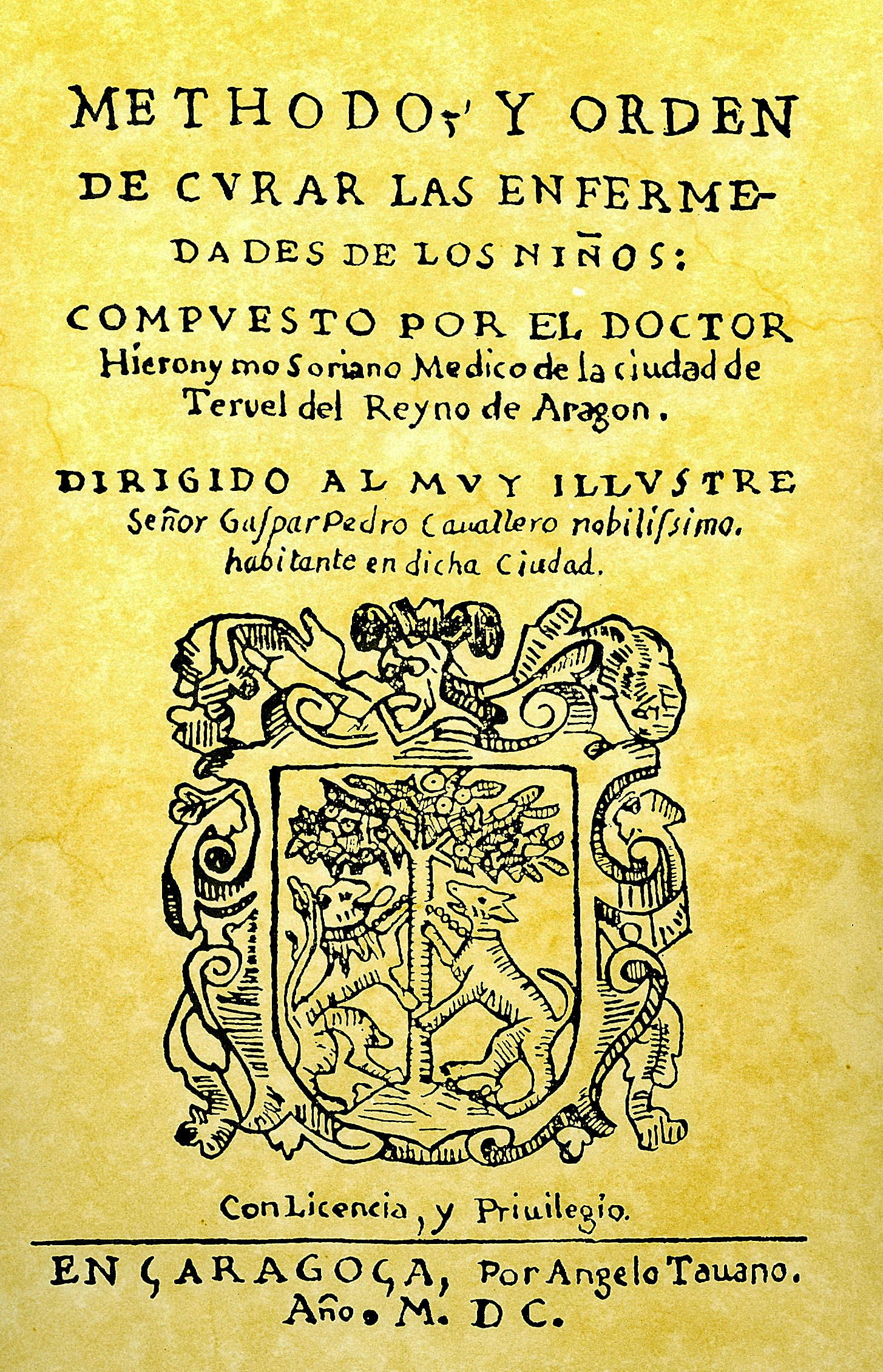 Portada del facsímil del libro Methodo y orden de curar las enfermedades de los niños, de Jerónimo Soriano (año 1600)